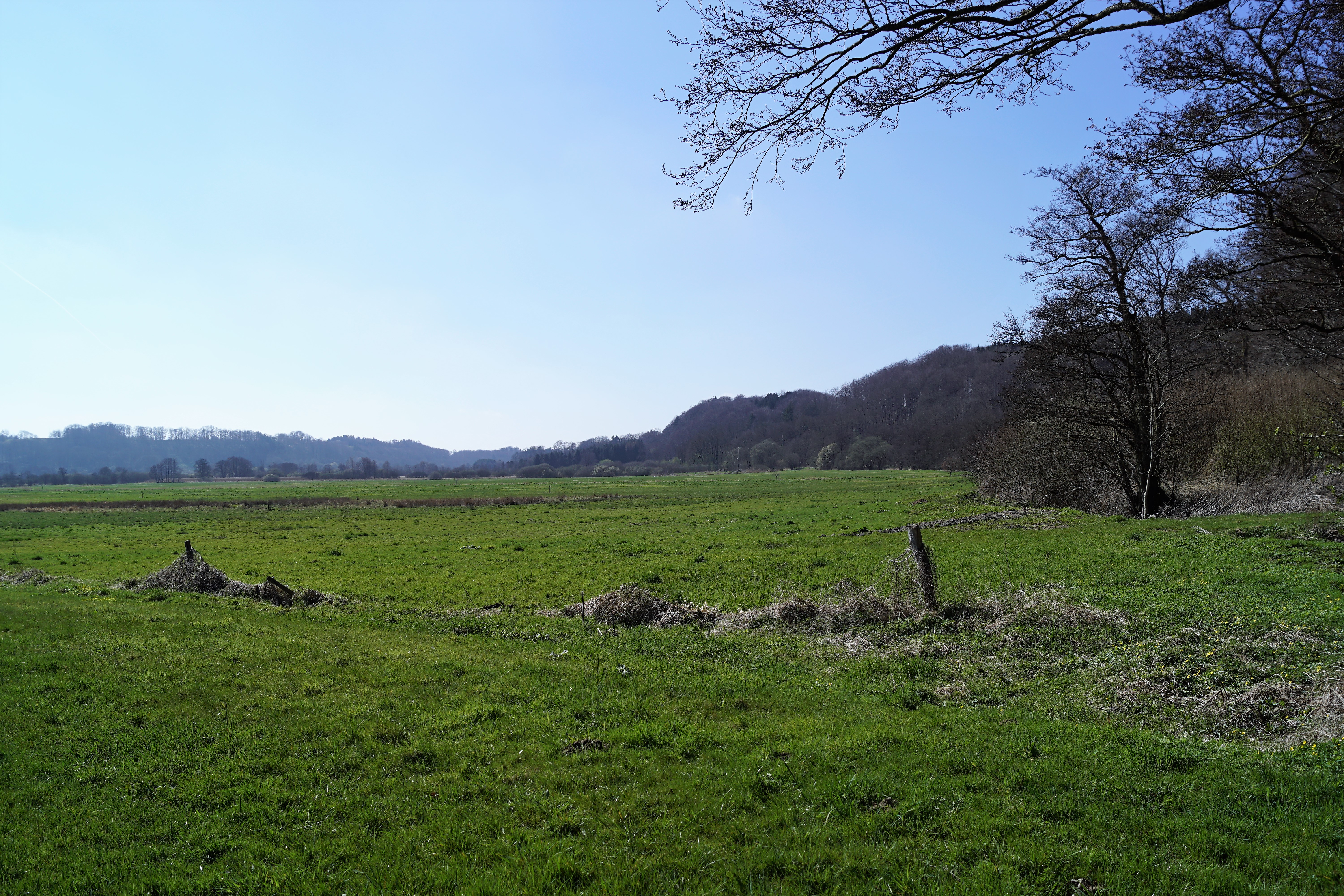 Vejle Ådal ved Ravningbroen